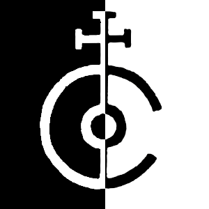 Hierro y divisa de la ganadería de Vicente José Vázquez, creadora de la Casta Vazqueña de toros bravos de lidia